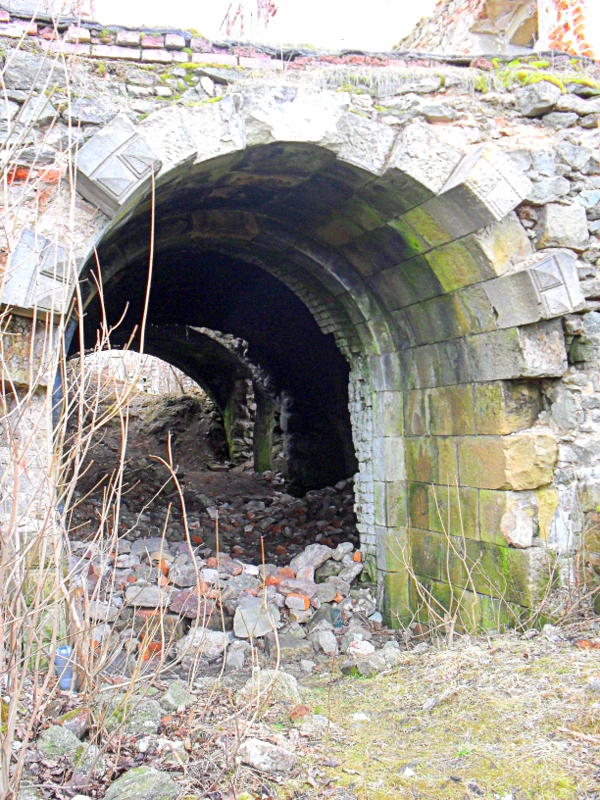 Kamienna Góra, ruiny zamku